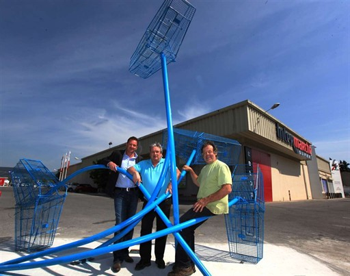 Ne jamais oublier la tragédie du 15 juin 2010